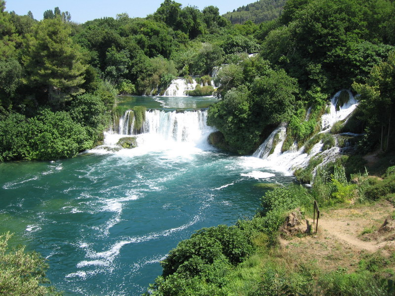 National park Krka